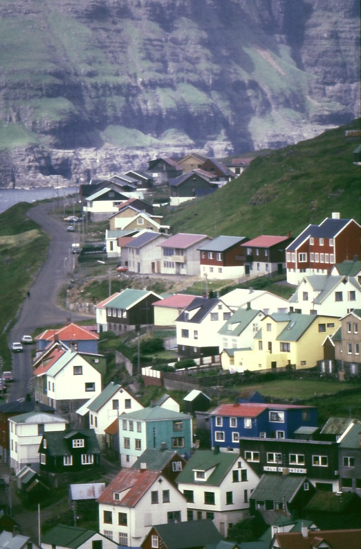 Titel: Eiði